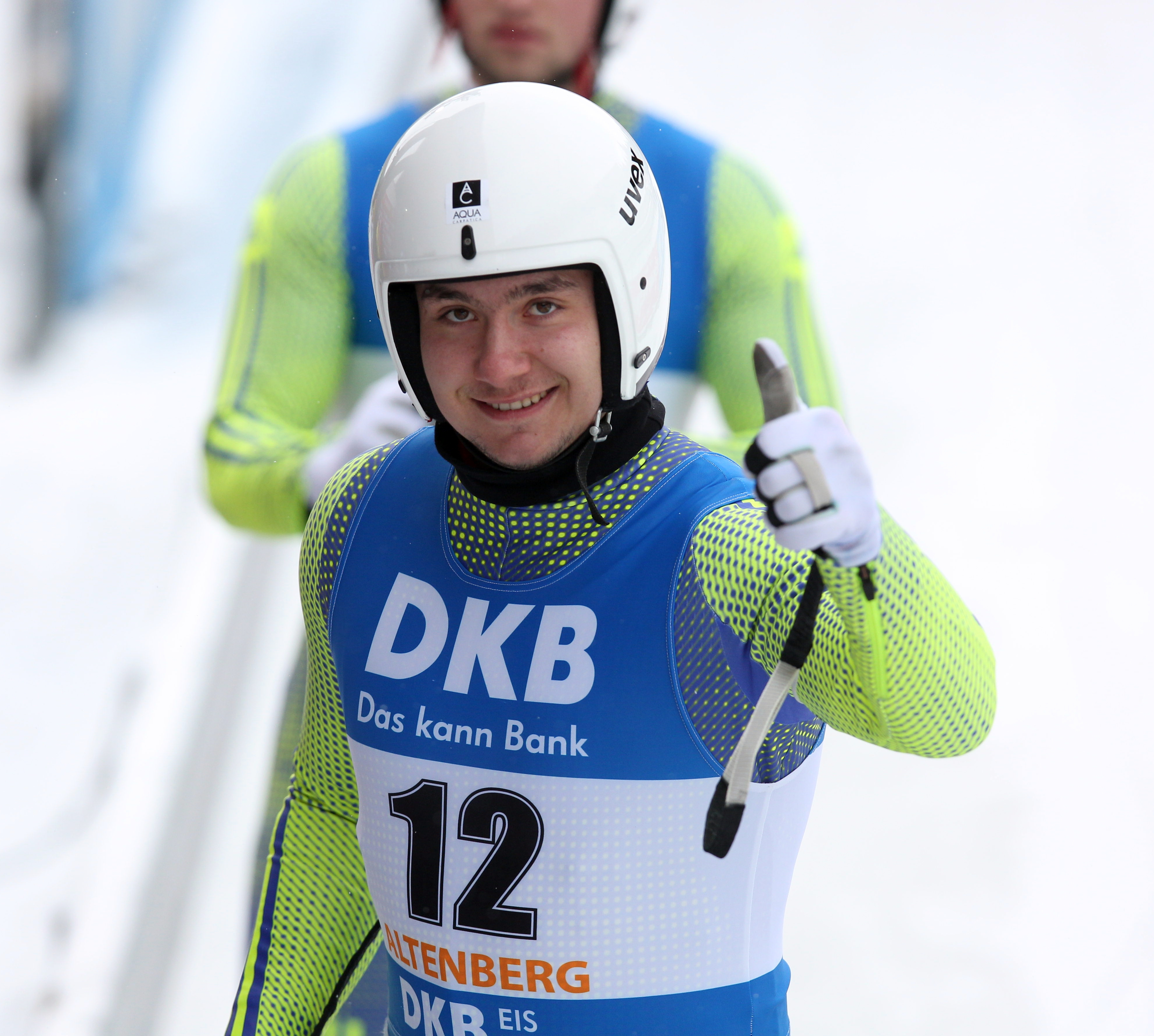 Cosmin Atodiresei beim Rennrodel-Nationencup der Doppelsitzer in Altenberg 2017